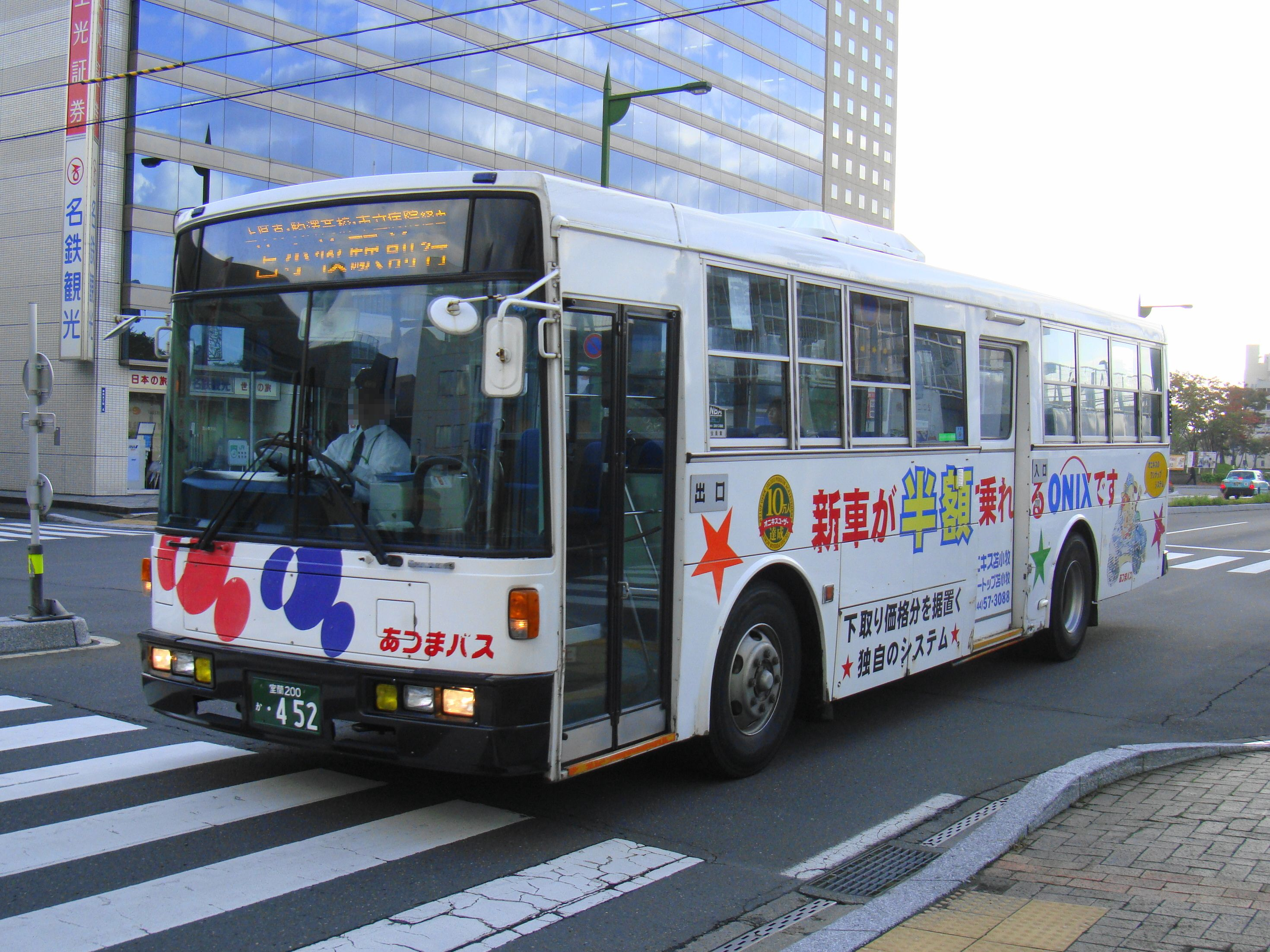 Atsuma to Tomakomai